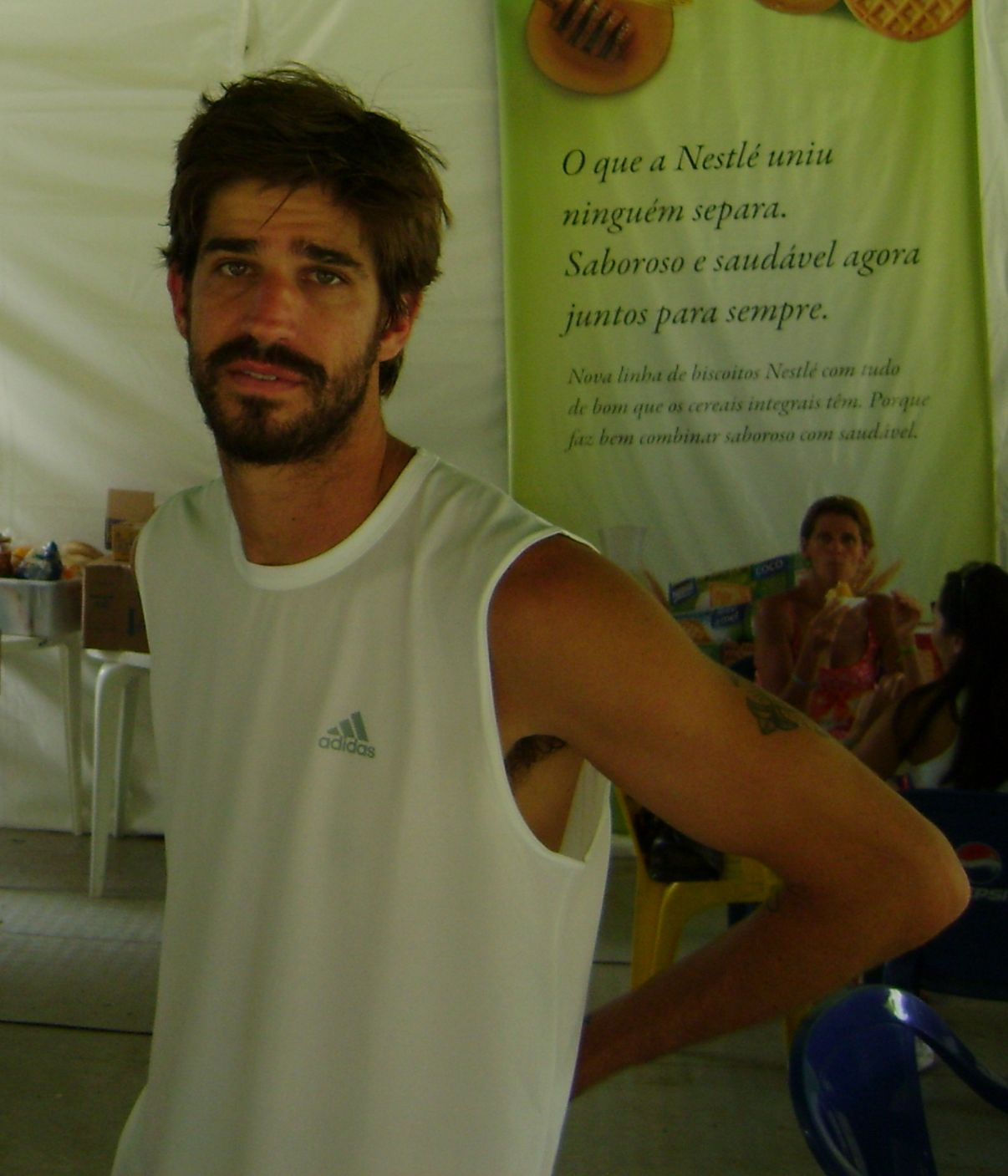 Tenista brasileiro Flávio Saretta, no Aberto de São Paulo de Tênis.